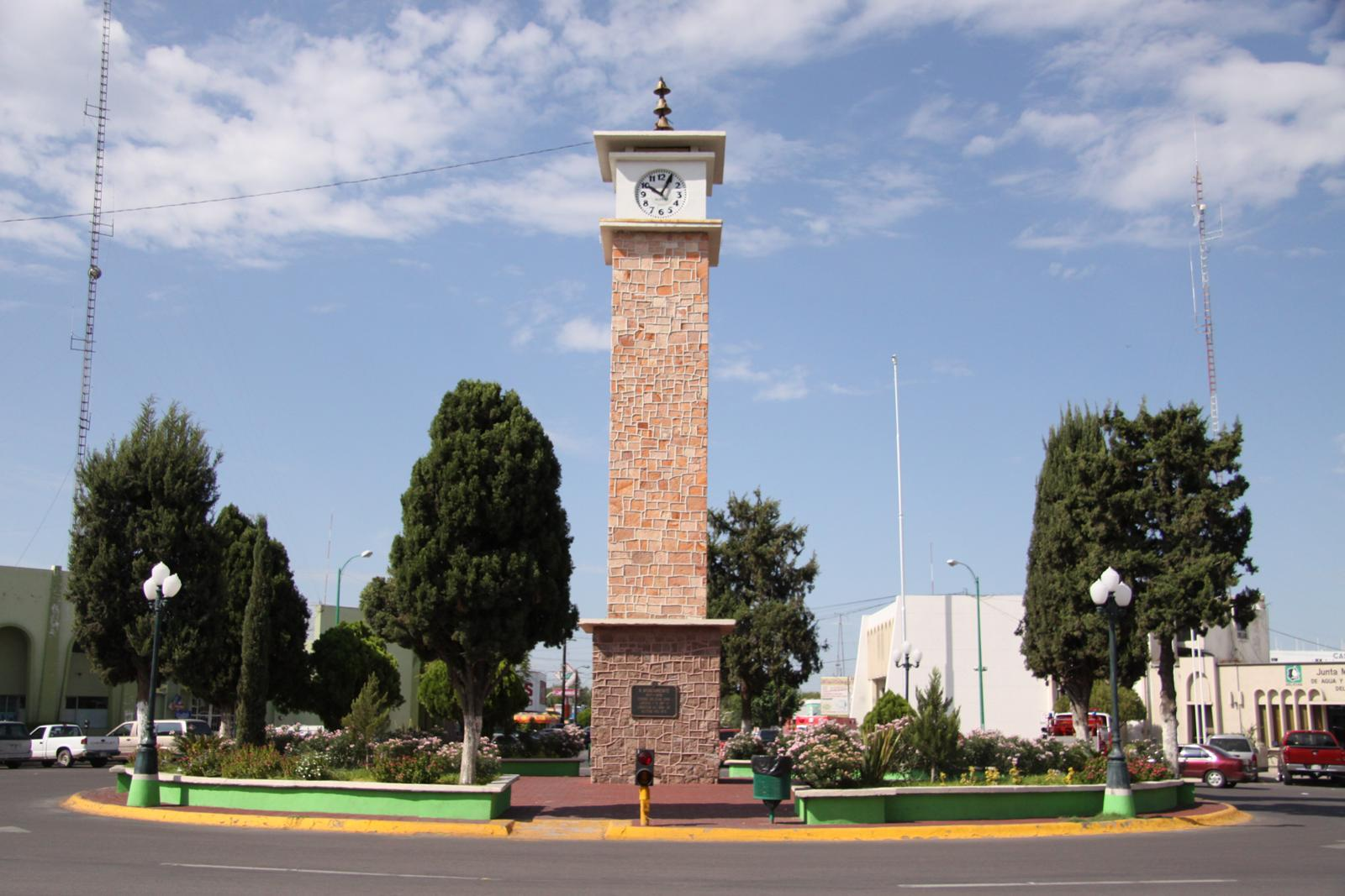 Reloj Publico y Punto central de la Ciudad